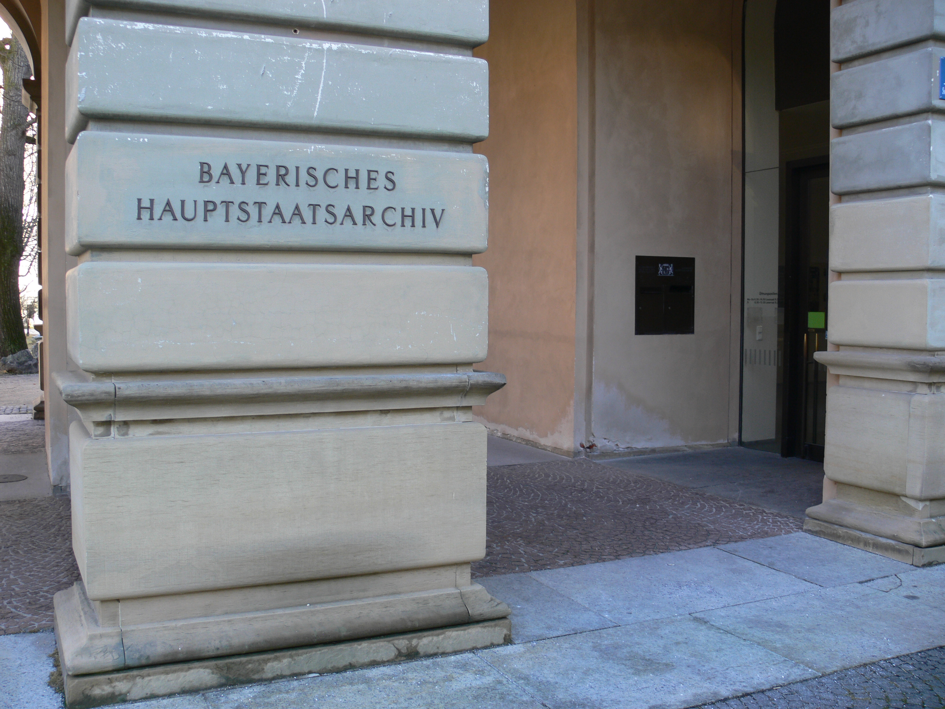 München, Bayerisches Hauptstaatsarchiv Schönfeldstraße, Eingang